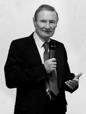 Profesor Wyższej Szkoły Informatyki i Zarządzania w Rzeszowie oraz Prorektor ds. Nauki tej uczelni